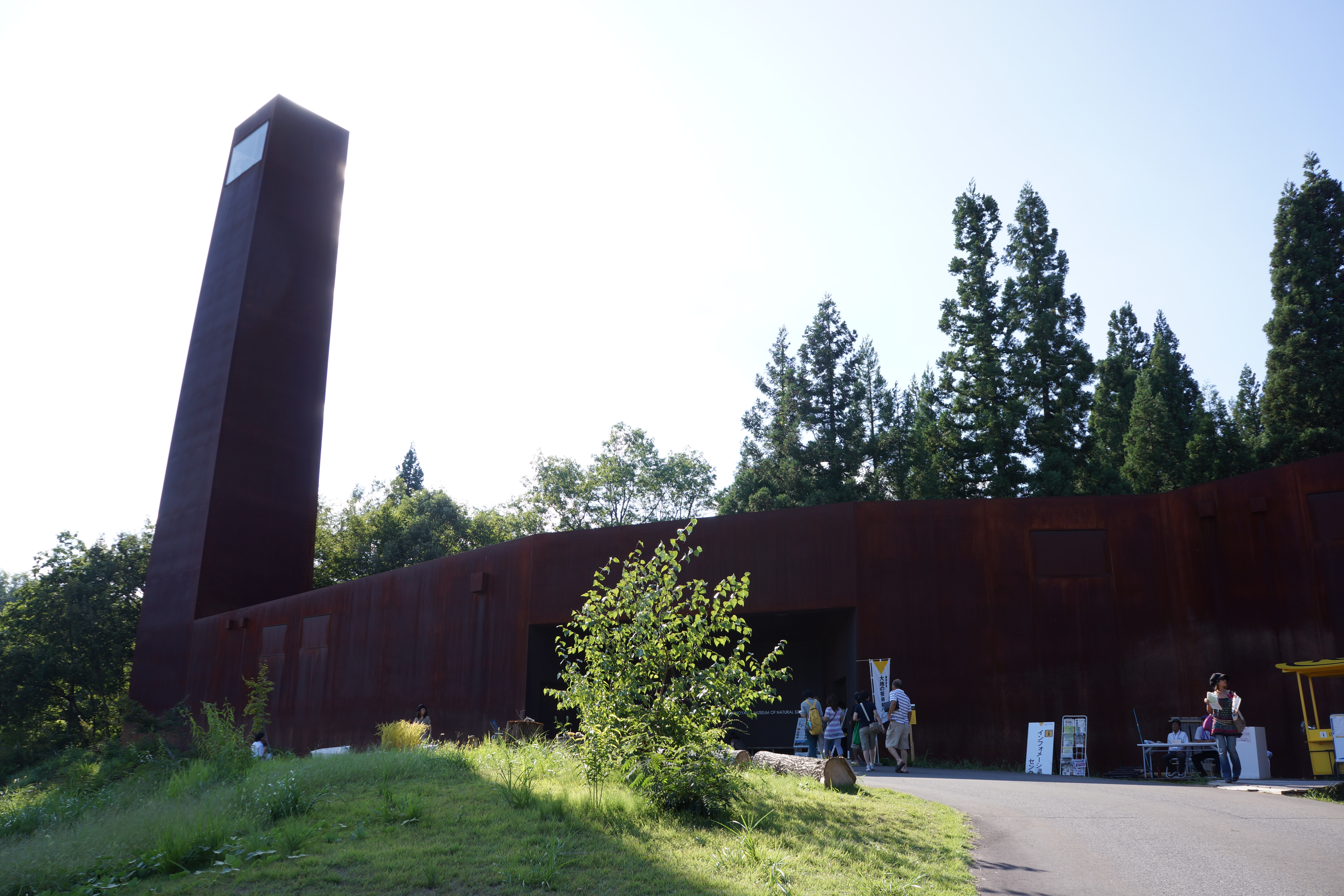 十日町市立里山科学館 越後松之山「森の学校」キョロロ